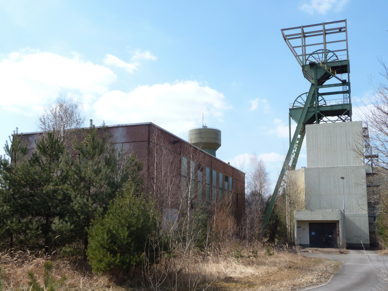 Schacht St. Charles IV in Großrosseln